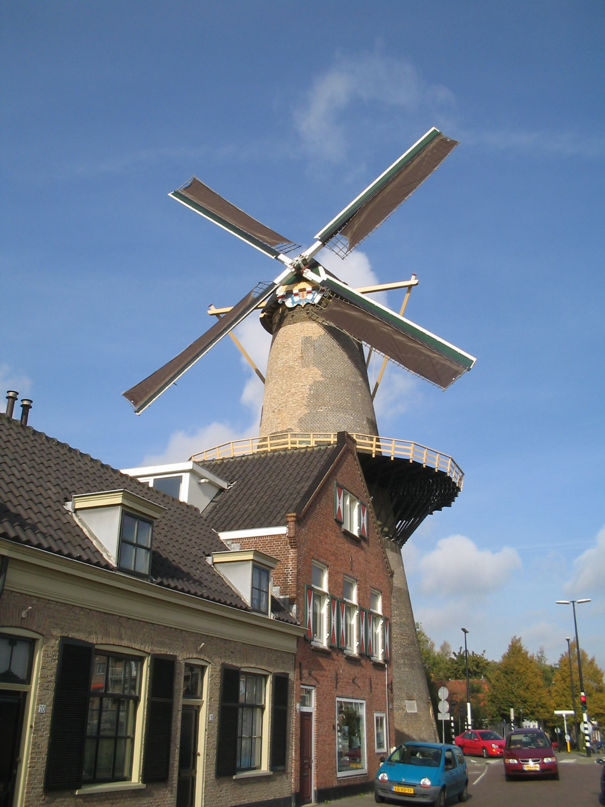 windmill Aeolus, Vlaardingen, Netherlands (26 okt 2005)